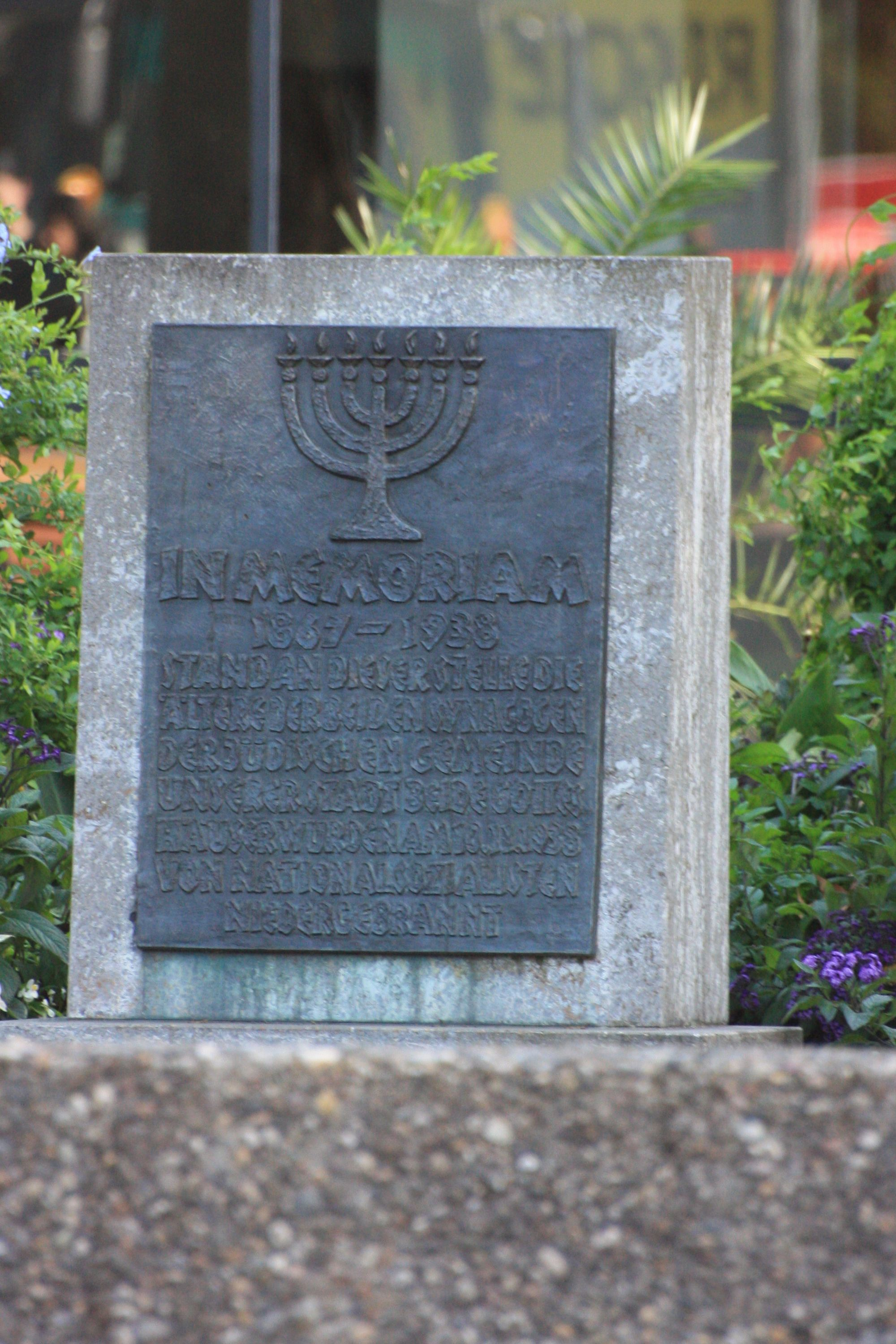 Gedenkstein für die 1938 abgebrannte Alte Synagoge in Gießen, Hessen